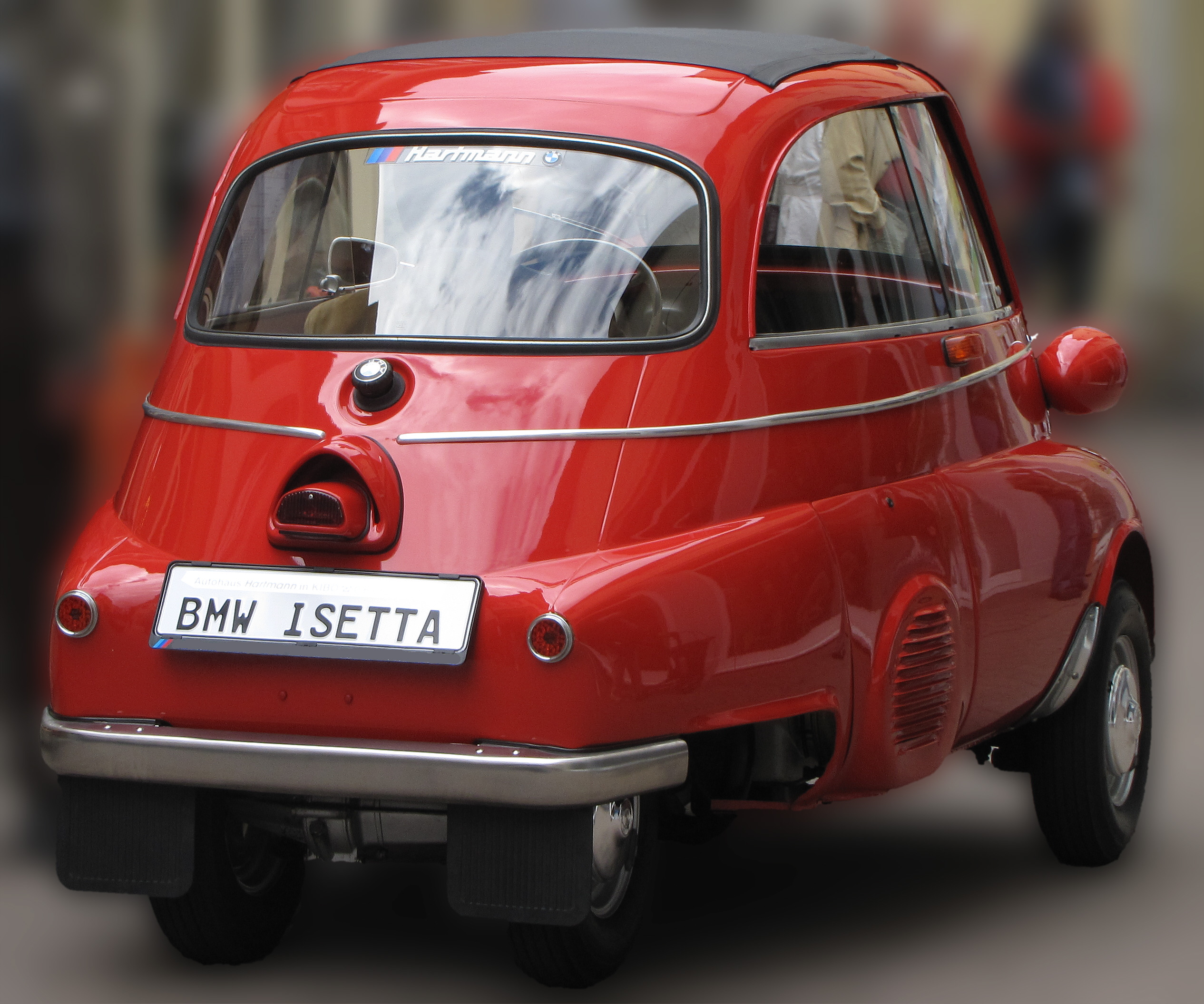 BMW Isetta 250 Export bis baujahr 1958